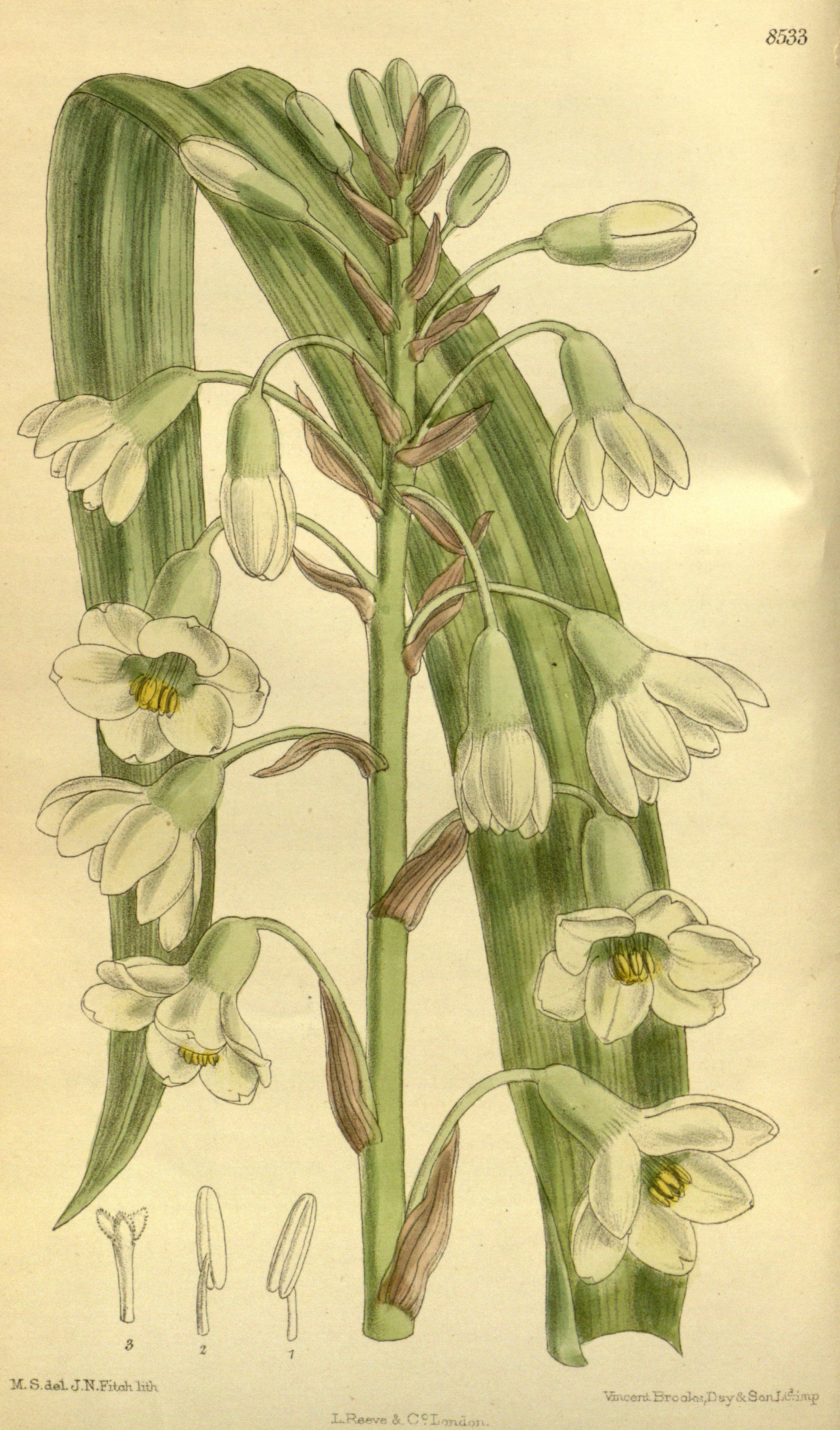 Galtonia princeps, Asparagaceae